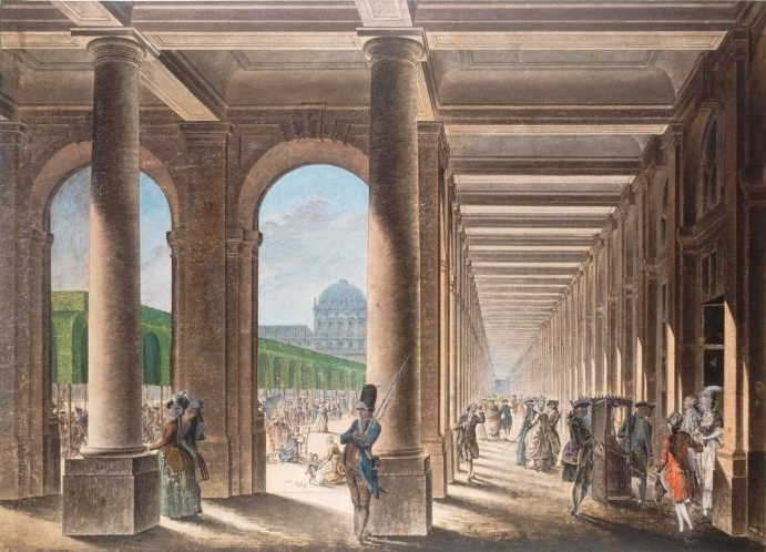 Jardin du Palais Royal et galerie de Montpensieur, Paris, 18e siècle. Dessin à la plume et lavis à l'encre de Chine, aquarelle et rehauts de gouache, 43 x 59,3 cm, en provenance de la collection Hippolyte Destailleur.